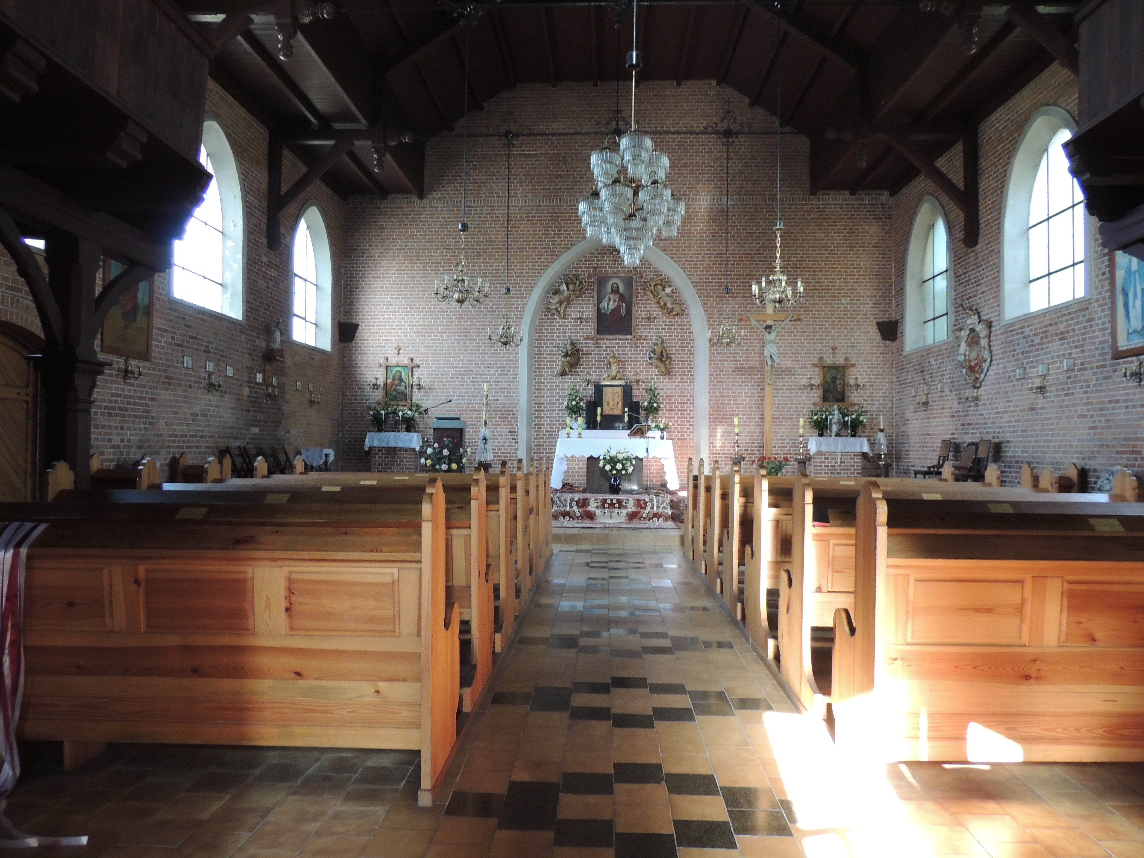 Elbląg, kościół mennonicki, ob. polsko-katolicki p.w. Dobrego Pasterza, 1880-1890